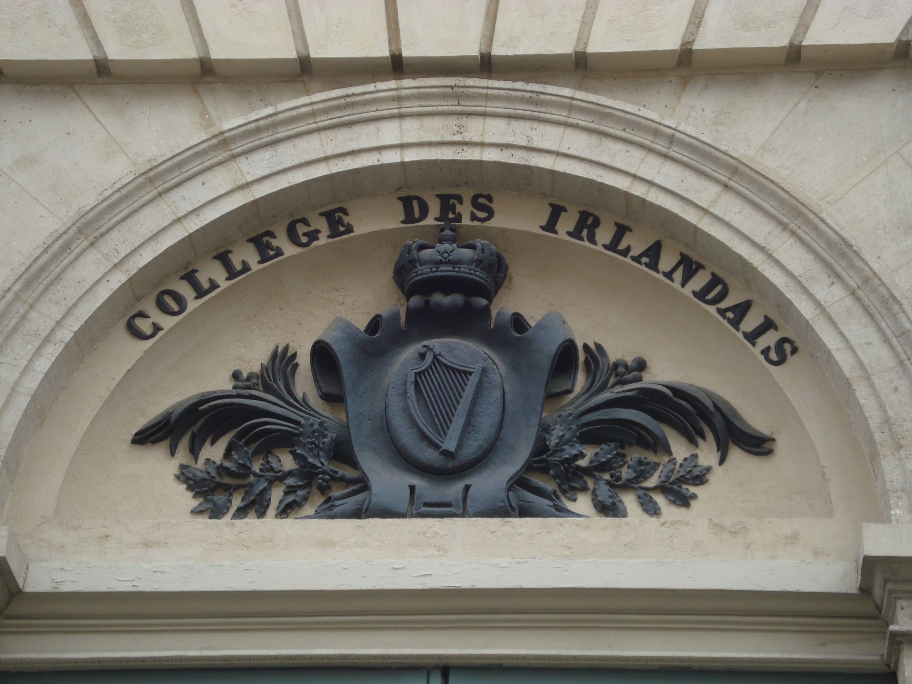 Fronton de la porte d'entrée du Collège des Irlandais, 5 rue des Irlandais à Paris